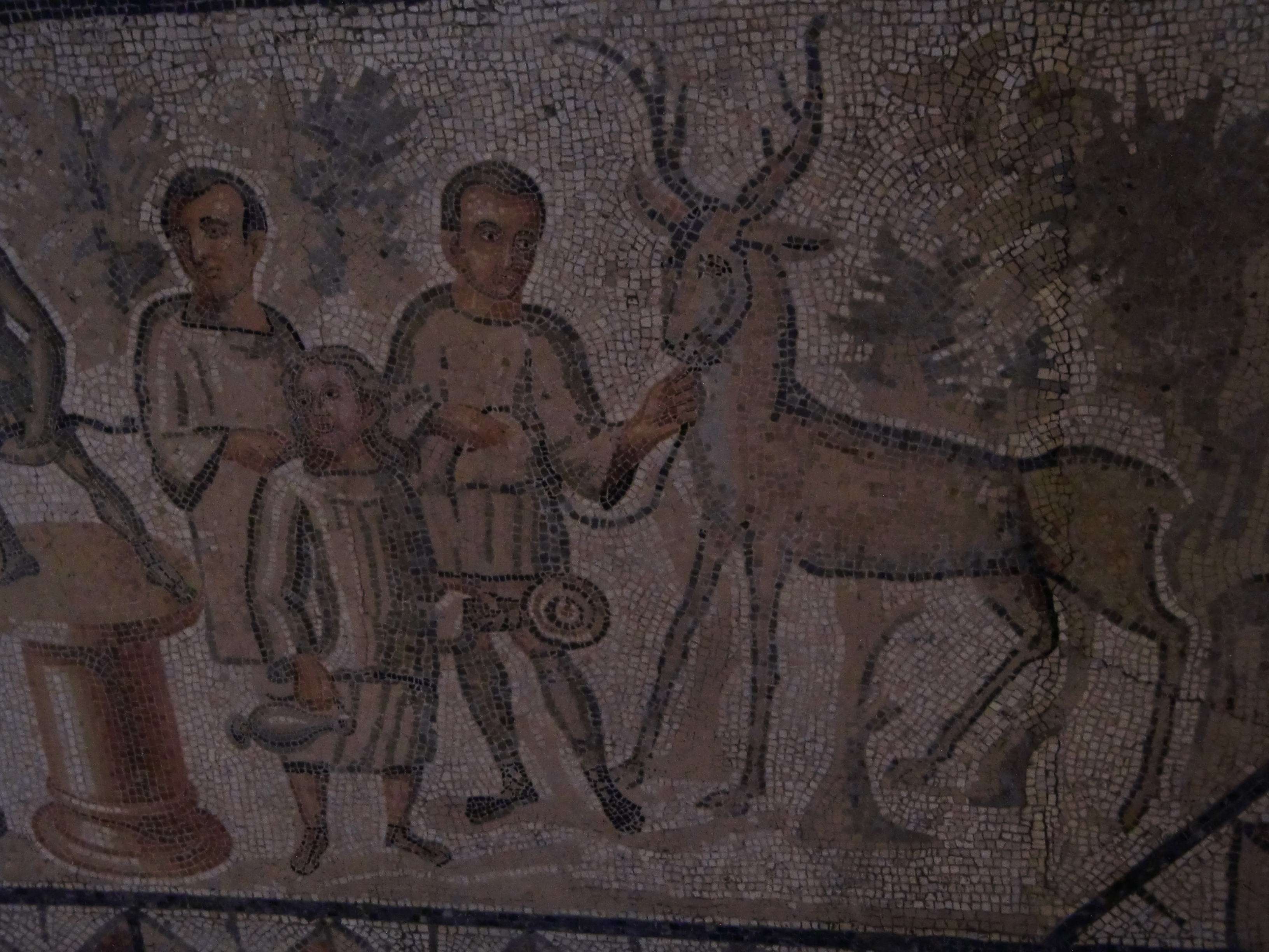 Mosaïque de Lillebonne - détail